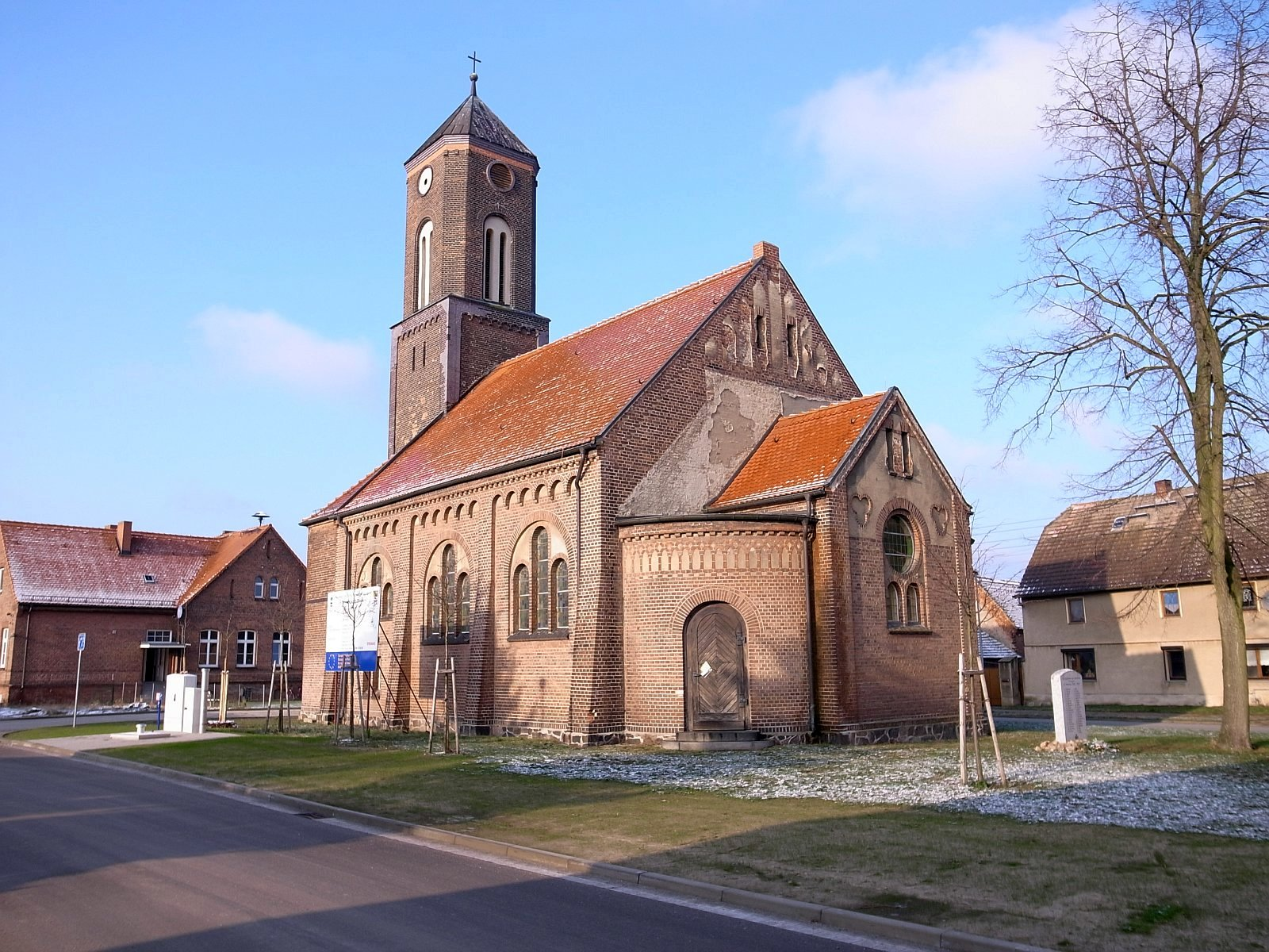 Kirche in Thurland 2009